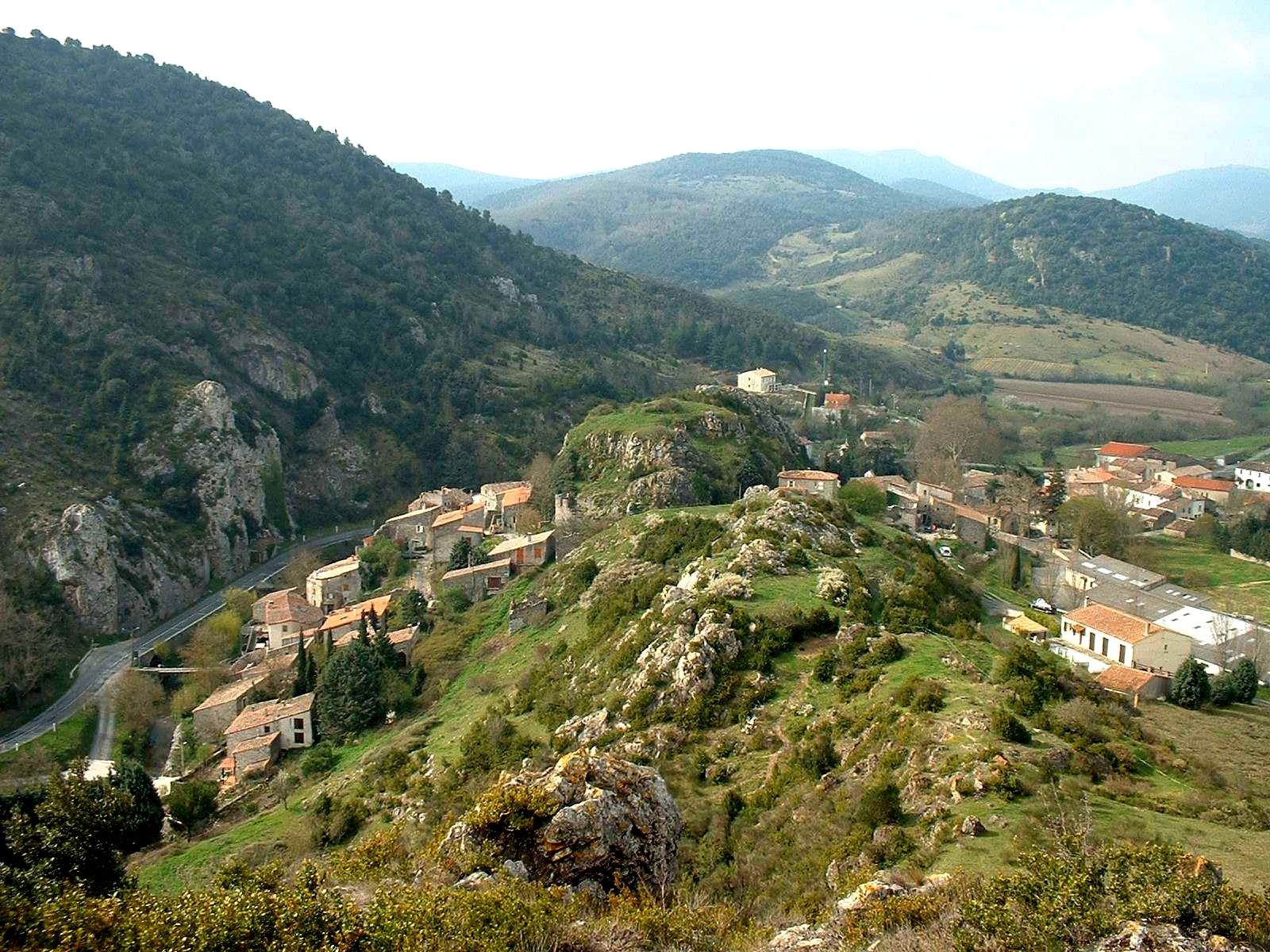 Laroque-de-Fa (France) - Rocher